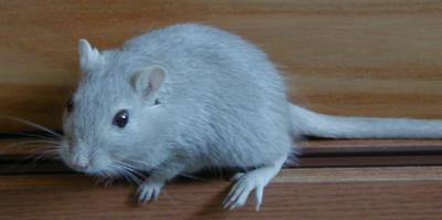 Meriones unguiculatus (gerbille de Mongolie)